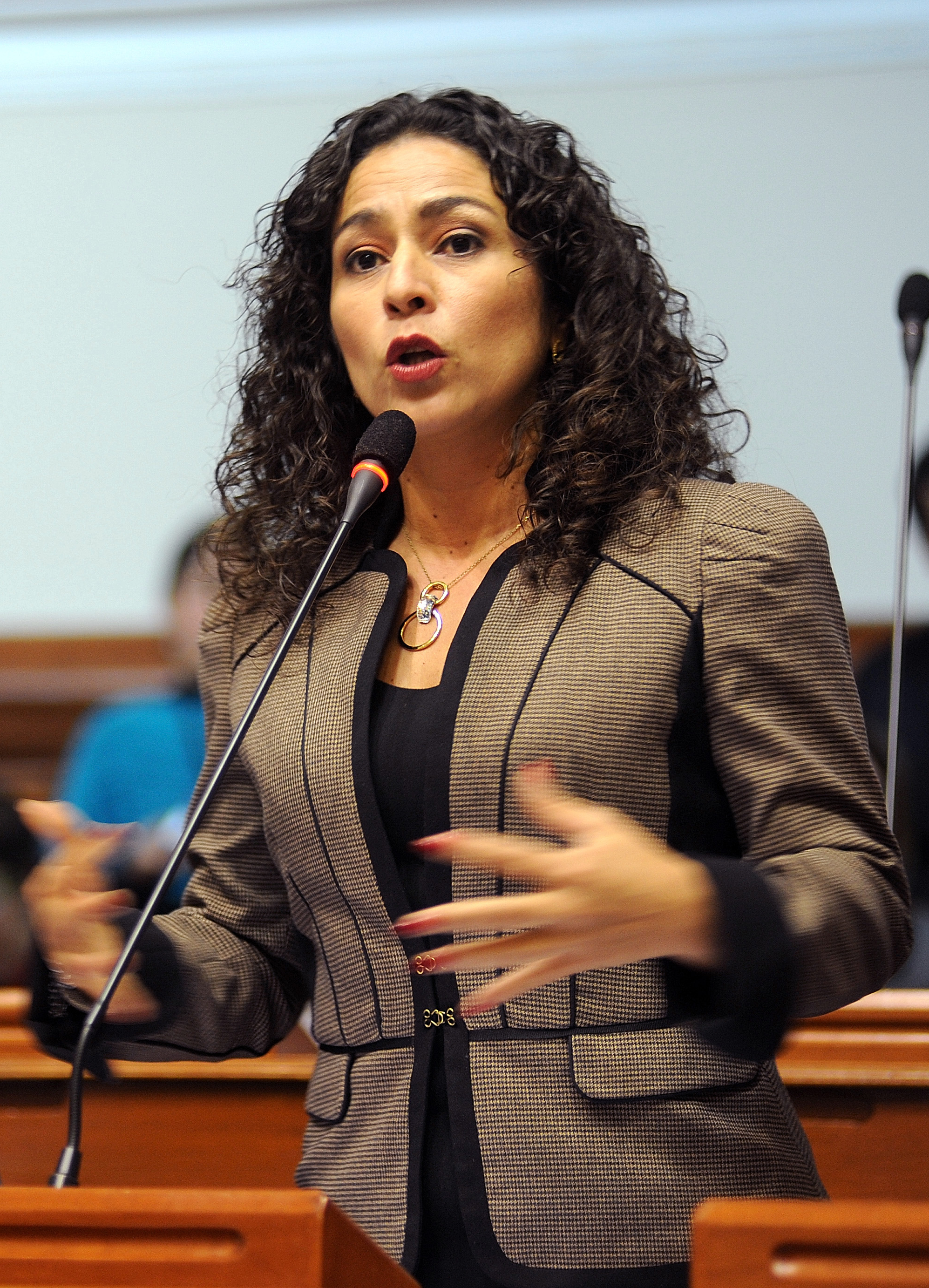 La congresista Cecilia Chacón De Vettori fija su posición en el debate parlamentario realizado esta tarde por el Pleno.